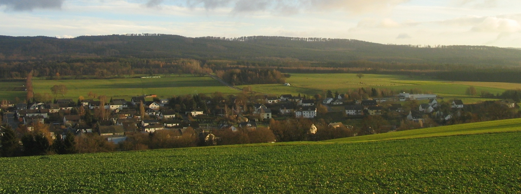 Tiefenbach im Hunsrück, im Hintergrund der Soonwald